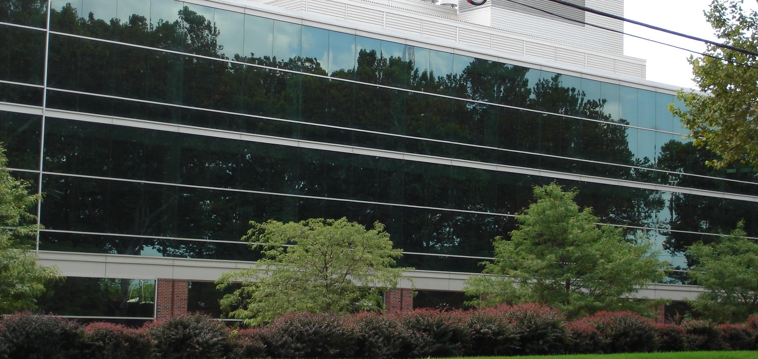 Battelle Memorial Institute in Columbus, Ohio